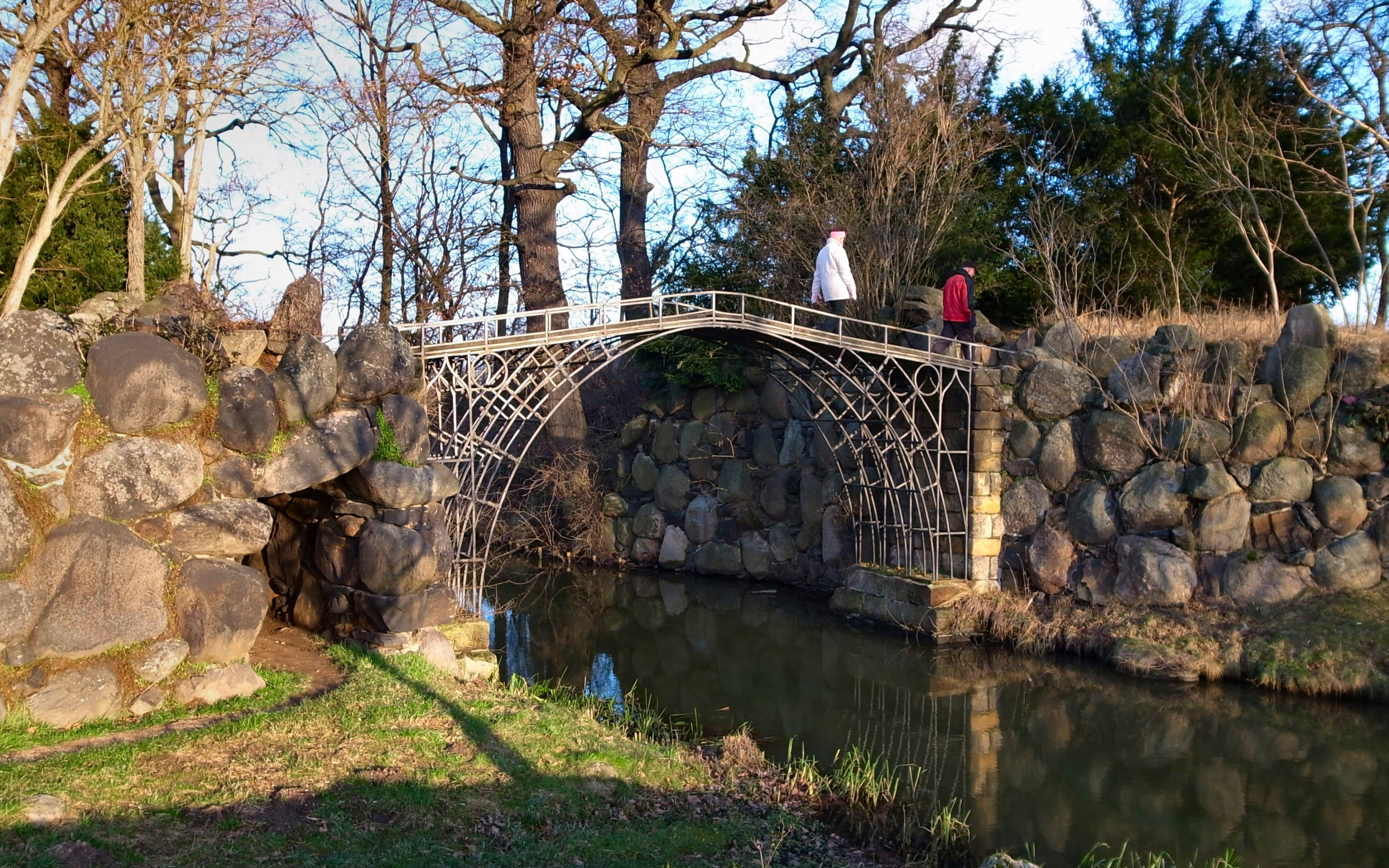 Wörlitz, Die Eiserne Brücke. 1791 gebaut,älteste Gusseiserne Brücke in Deutschland (Quelle:Brücken - Historisches, Konstruktion, Denkmäler von Uwe Erler und Helga Schmiedel, VEB Fachbuchverlag Leipzig, ISBN 3-343-00352-2)